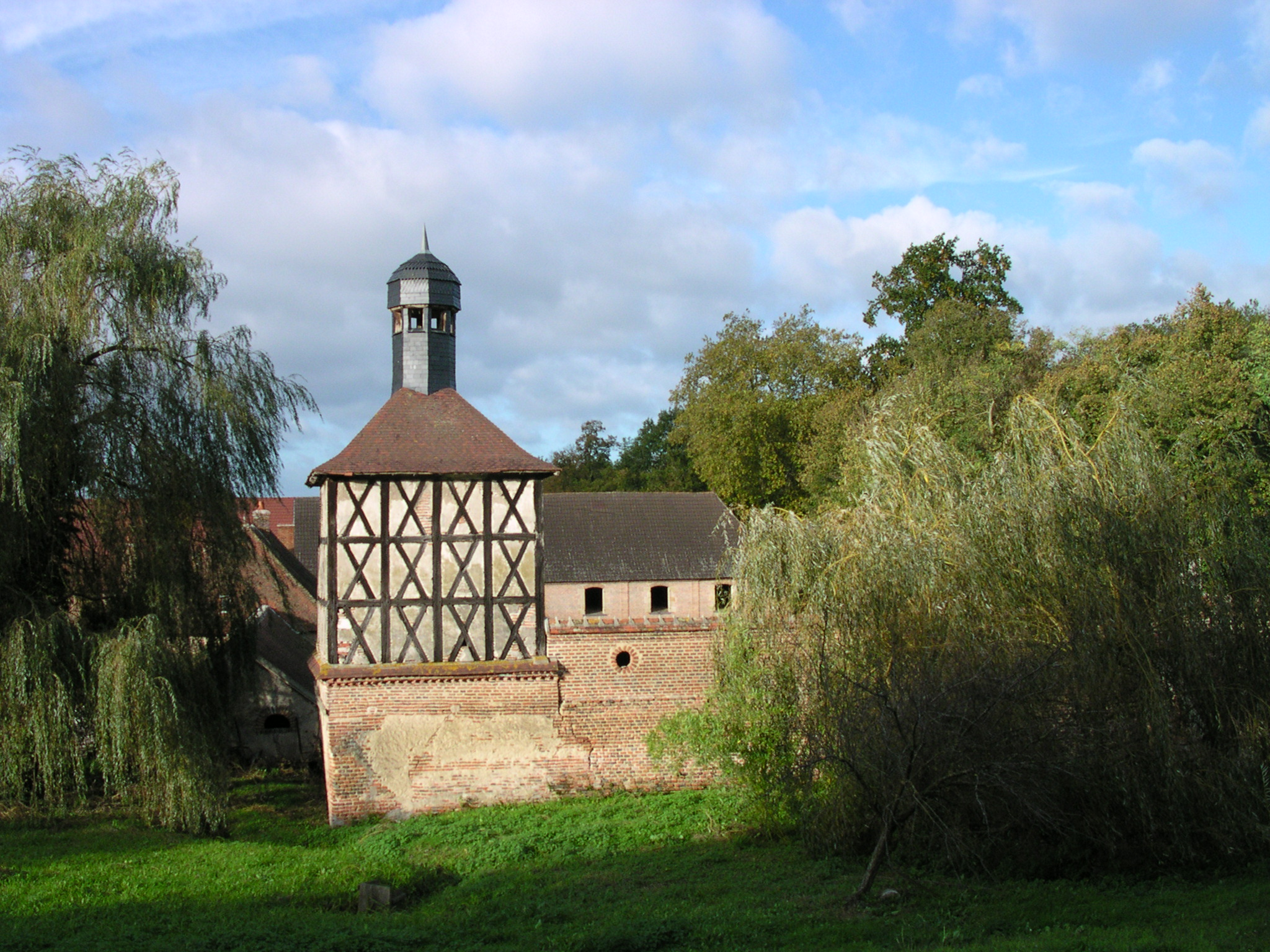 château (BESSAY-sur-ALLIER,FR03)